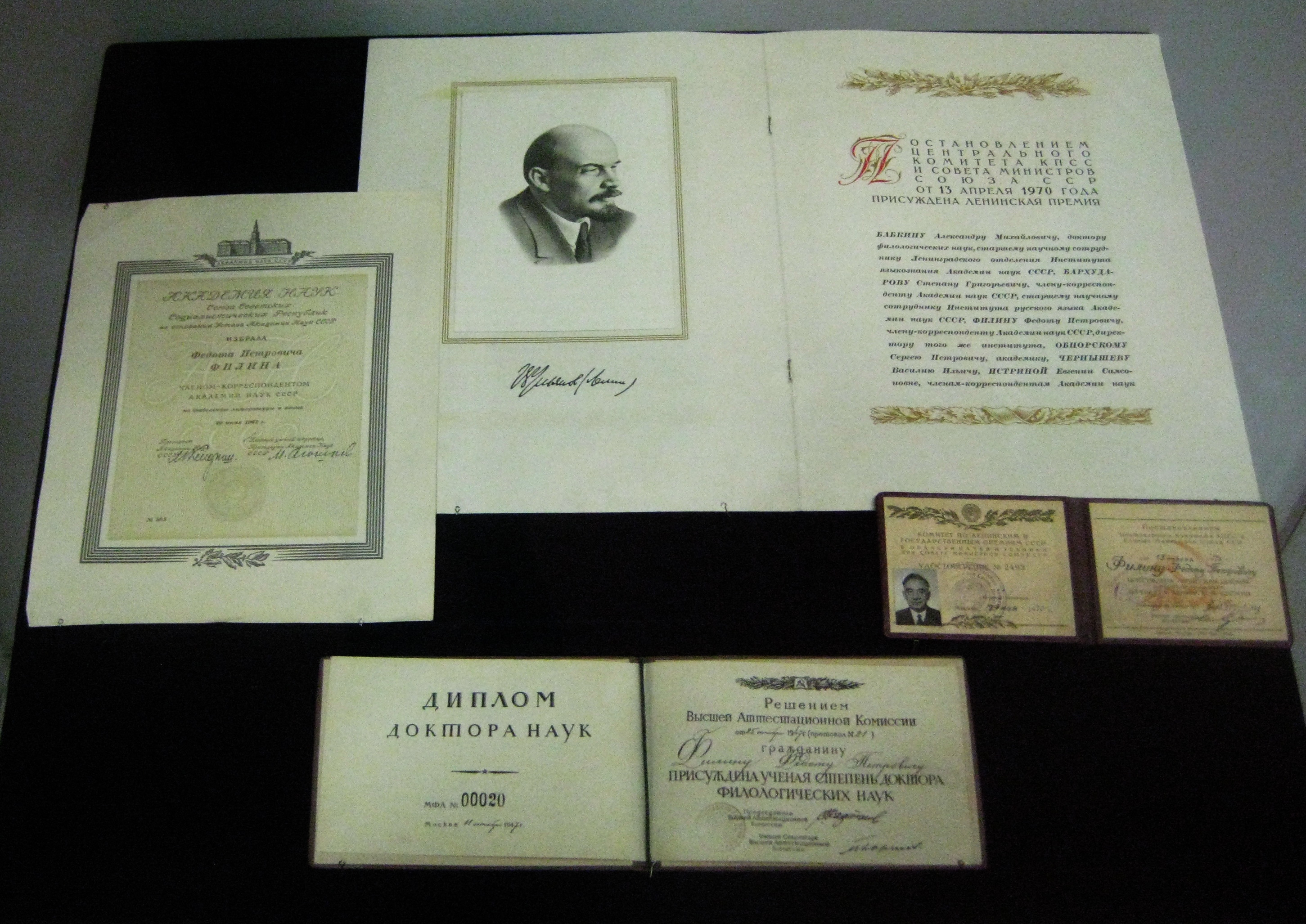 Музей Москвы (Провиантские склады)